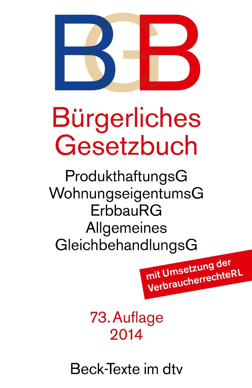 Bürgerliches Gesetzbuch